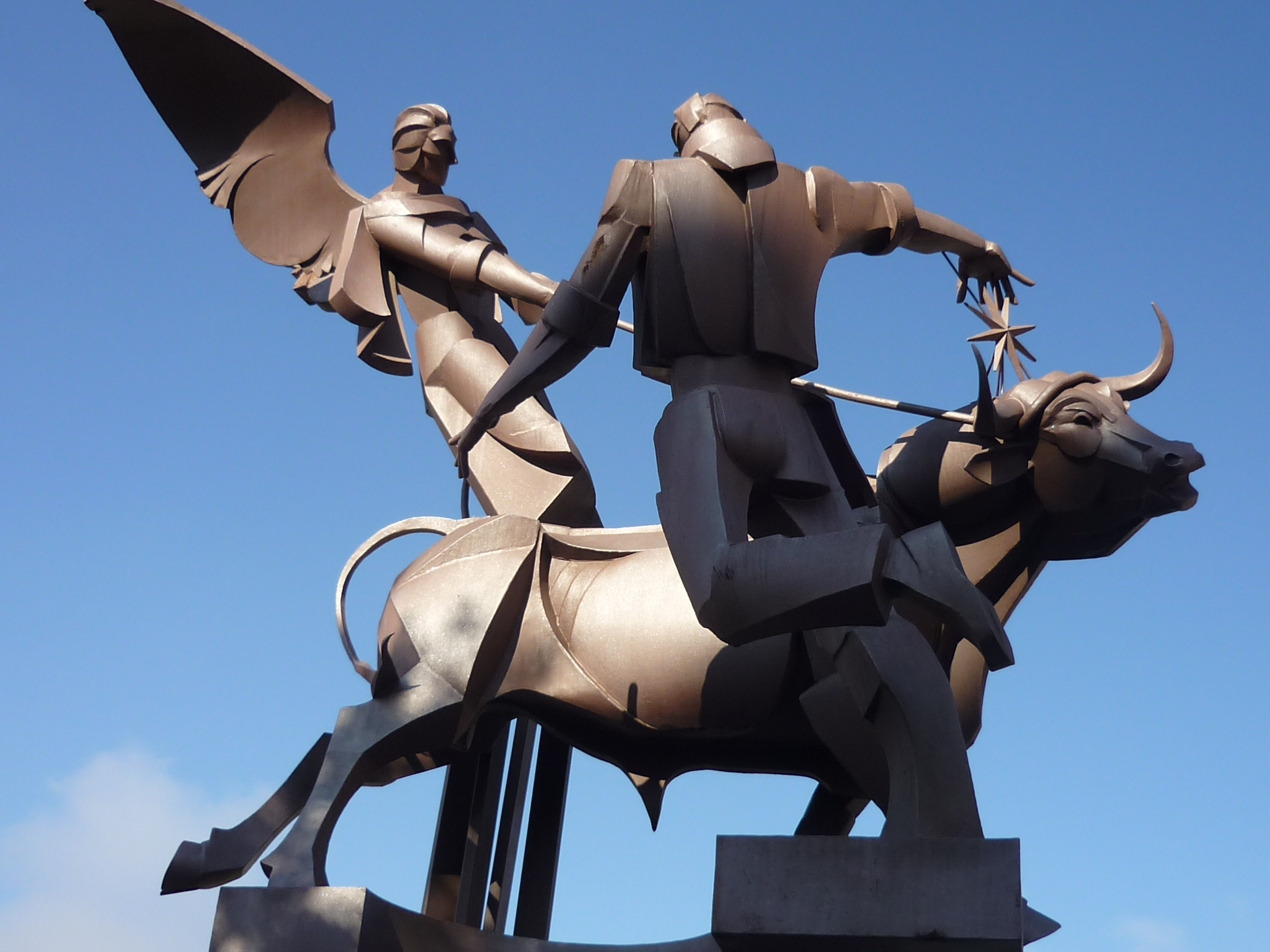 Aragonés: Toro y estrela